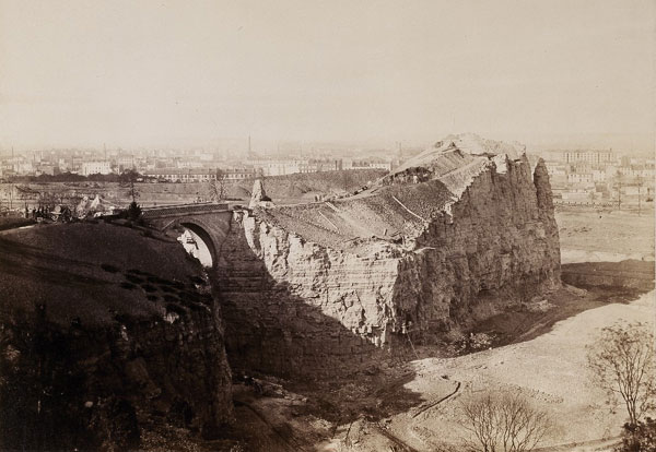 Charles Marville (1813-1879) Travaux d'aménagement du parc des Buttes Chaumont s. d. Bibliothèque nationale de France, Estampes, EO-7A (2)-FT-4